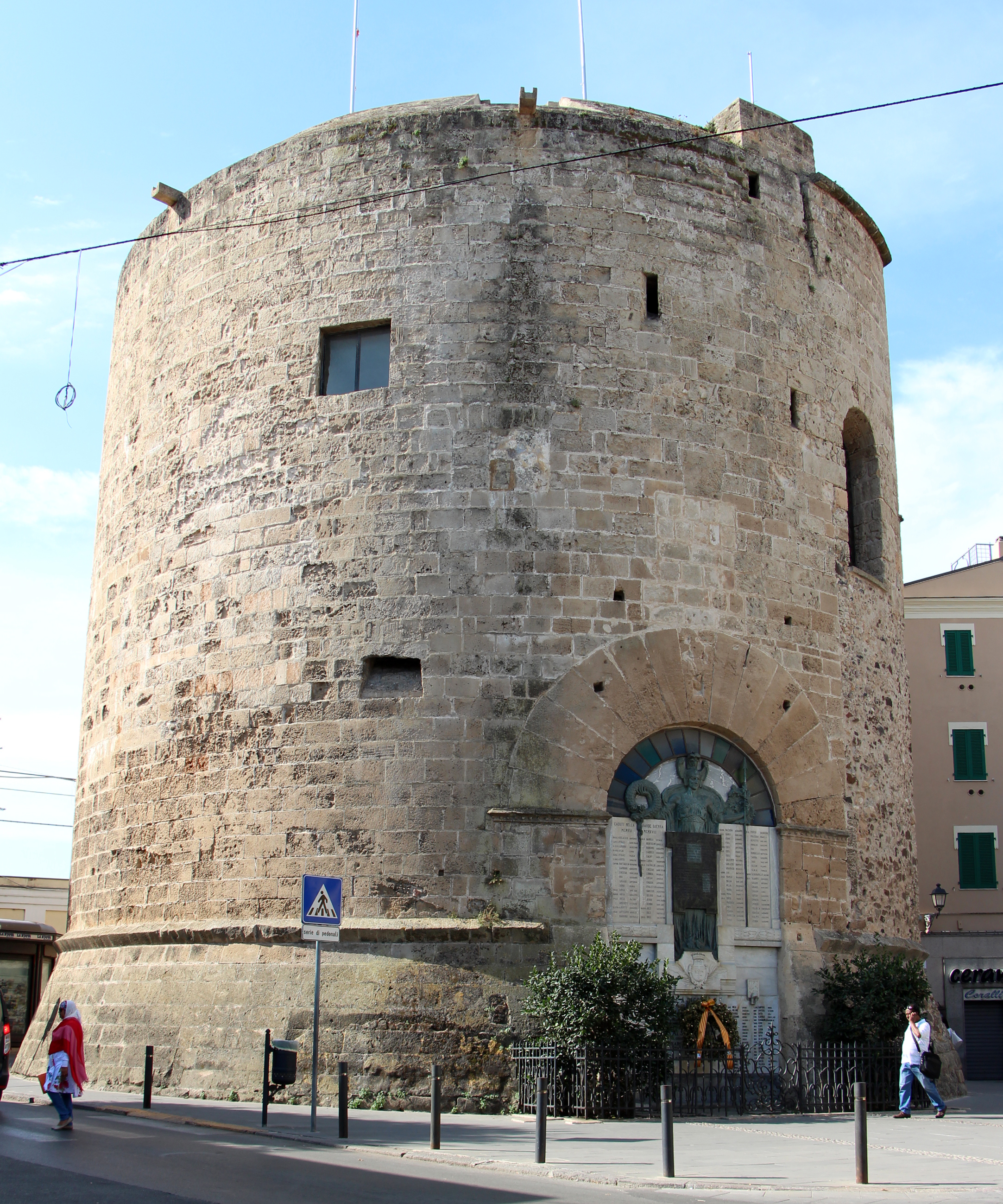 Alghero, mura e altri edifici